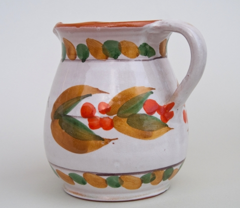 Bokal iz Hrvatskoga primorja